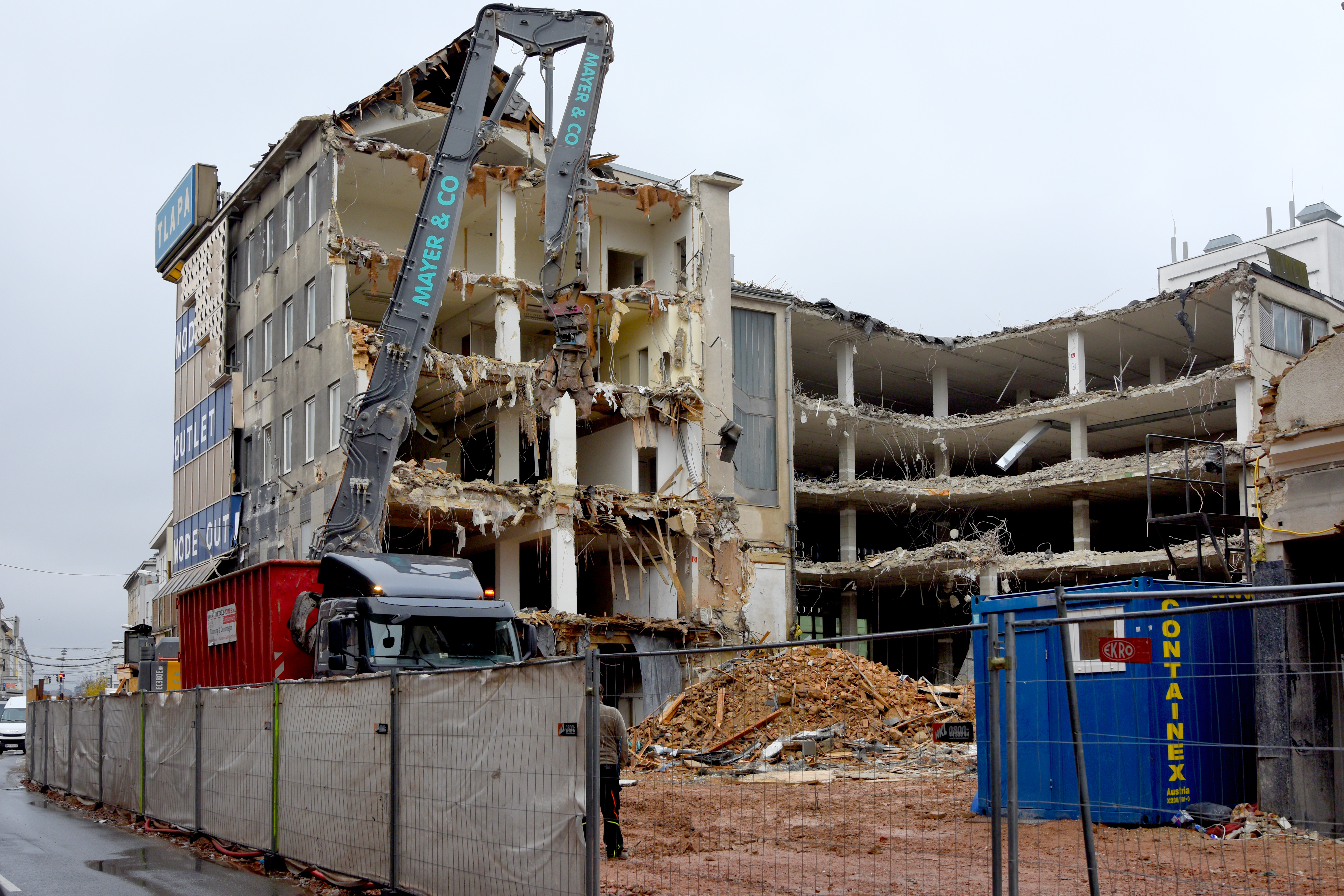 Abriss des Tlapa-Hauses an der Ecke Favoritenstraße/Sonnwendgasse im November 2019